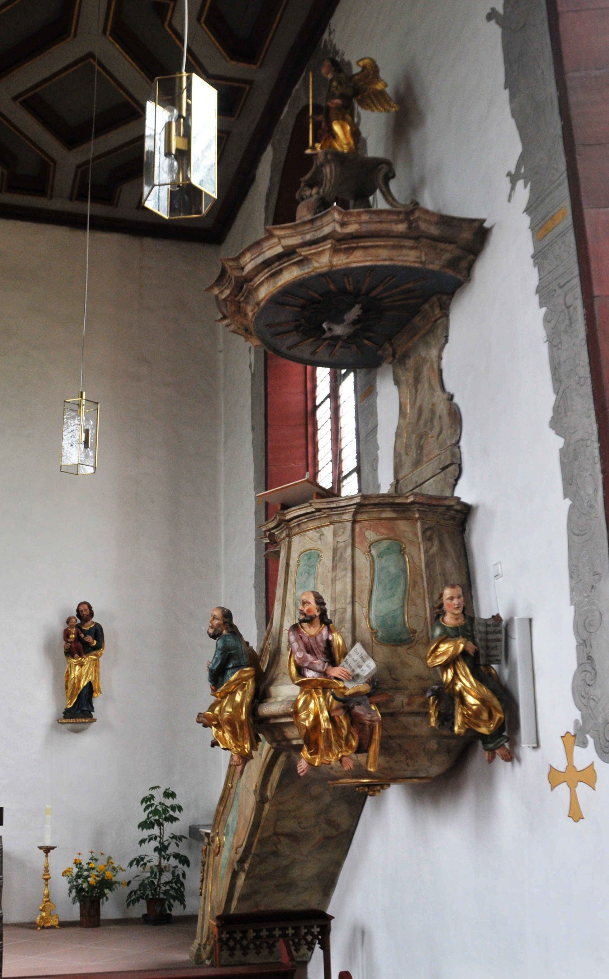 Wolfmannshausen, Kirche, Kanzel